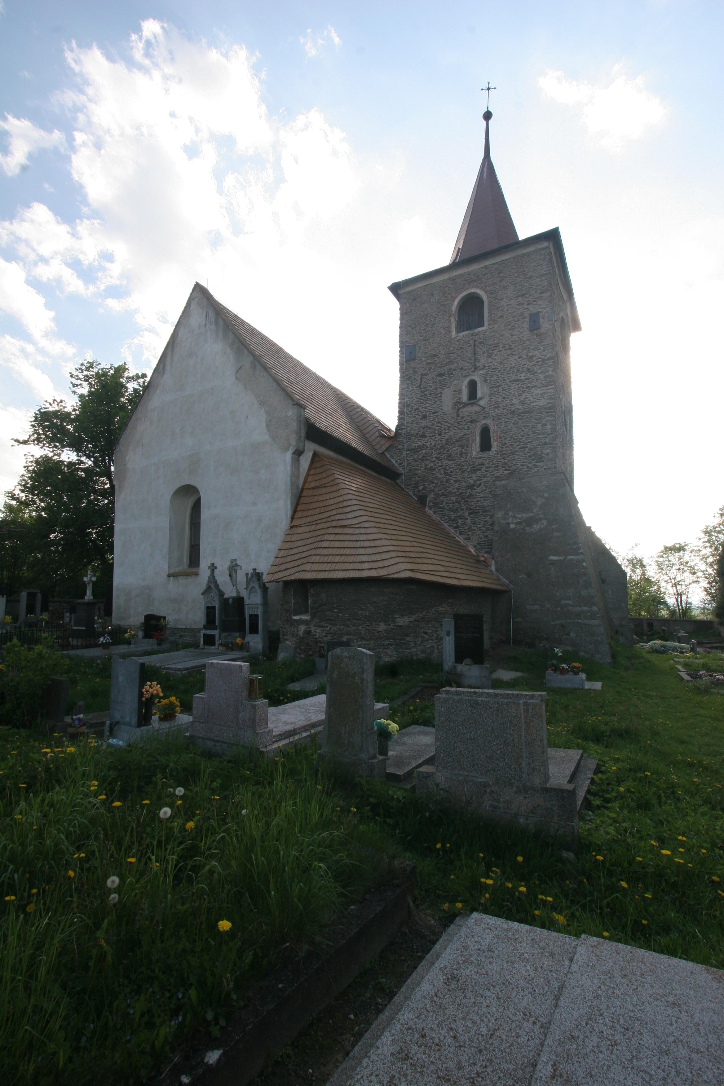 Kostel Navštívení P. Marie (Vysoká), Vysoká